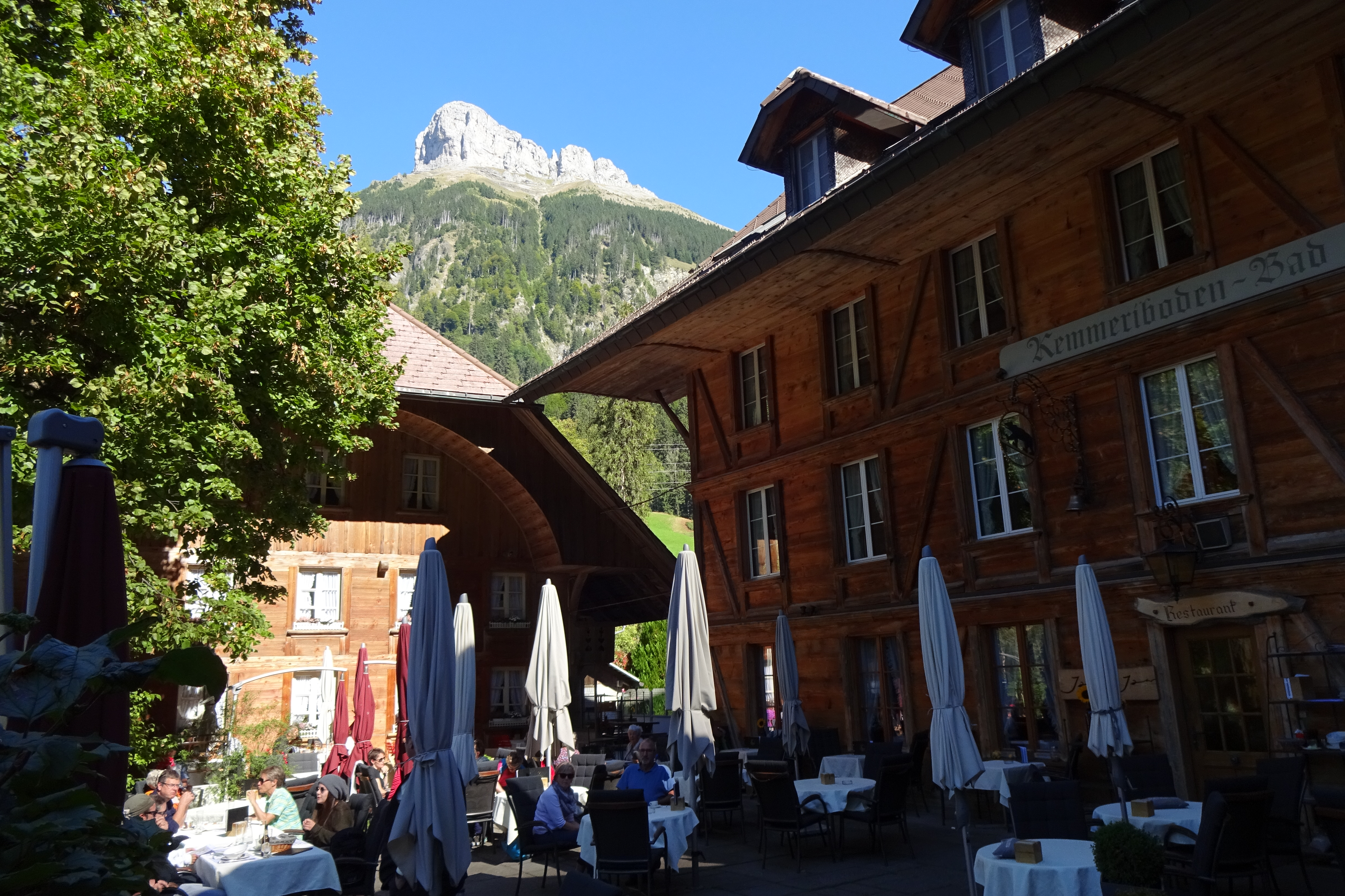 Schangnau-Kemmeriboden – Hotel Landgasthof Kemmeriboden-Bad (KGS-Nr 1206): Westfassade von Südwesten; im Hintergrund Schibegütsch (Schrattenfluh)